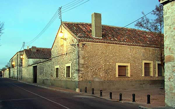 Viviendas en Nuevo Baztán. Foto: Xauxa 2005 Categoría:Arquitectura (imagen)